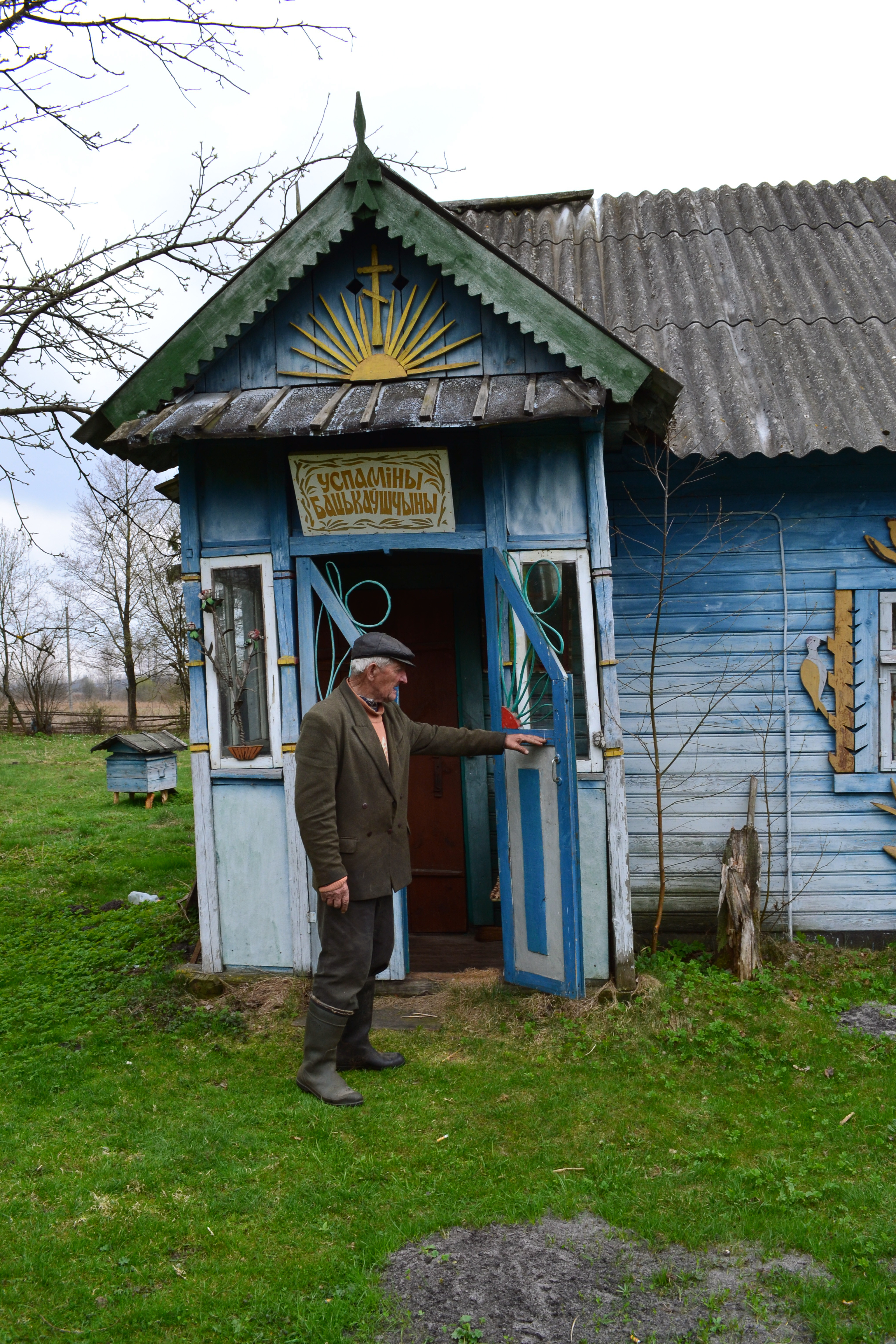 Беларуская (тарашкевіца): Музэй «Успаміны Бацькаўшчыны» на сядзібе Мікалая Тарасюка ў Стойлах Пружанскага раёну